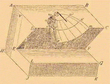 СкафисСкафис (солнечные часы древних)